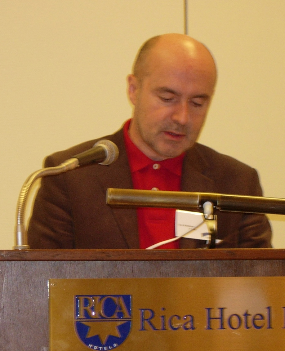 Stortingsrepresentant Ivar Kristiansen fra Nordland fylke, Høyre